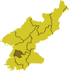 Map of Pyongyan, DPRK, 2006